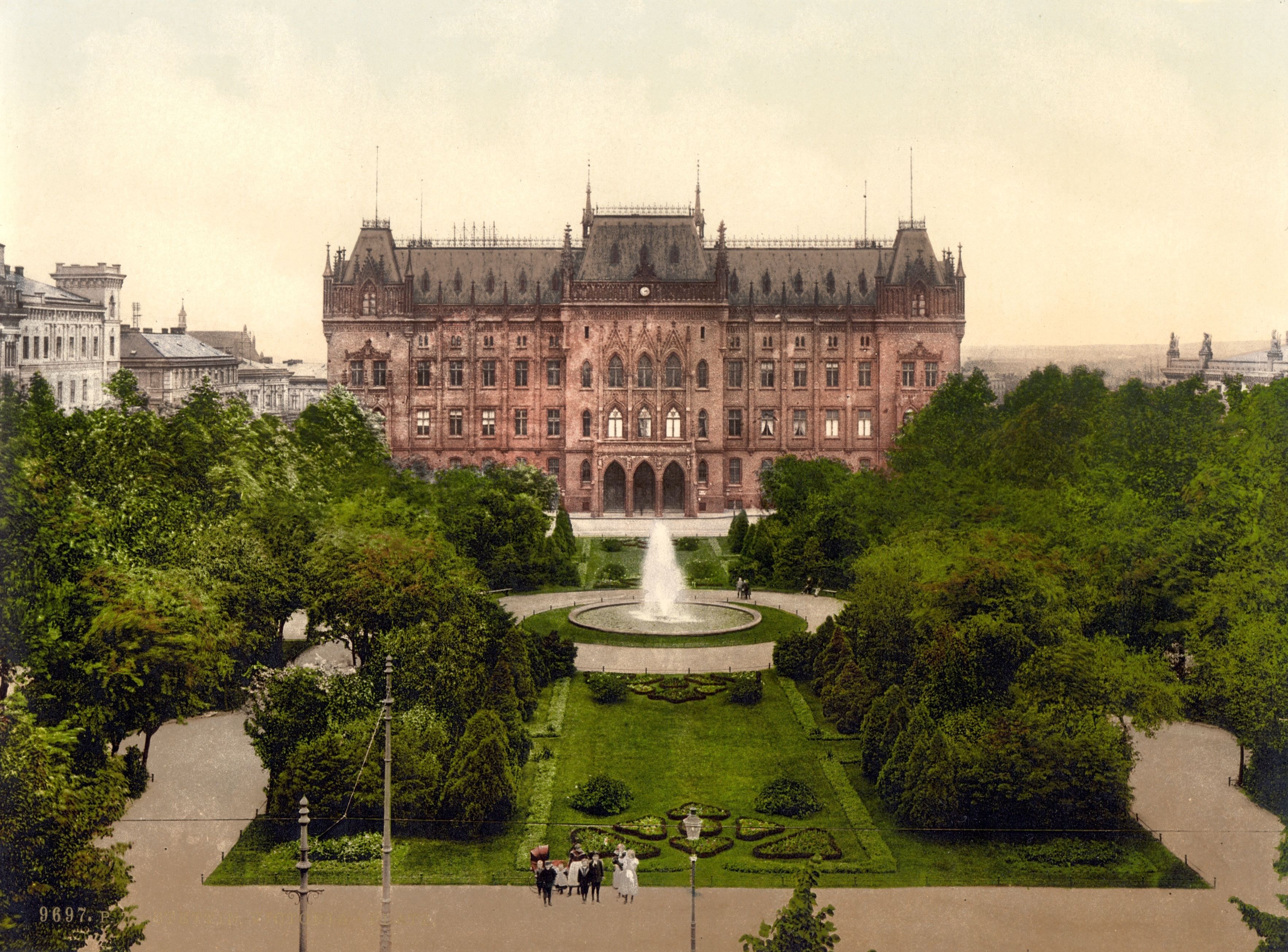 Widok na Czerwony Ratusz w Szczecinie oraz Viktoriaplatz (współcześnie plac Stefana Batorego).